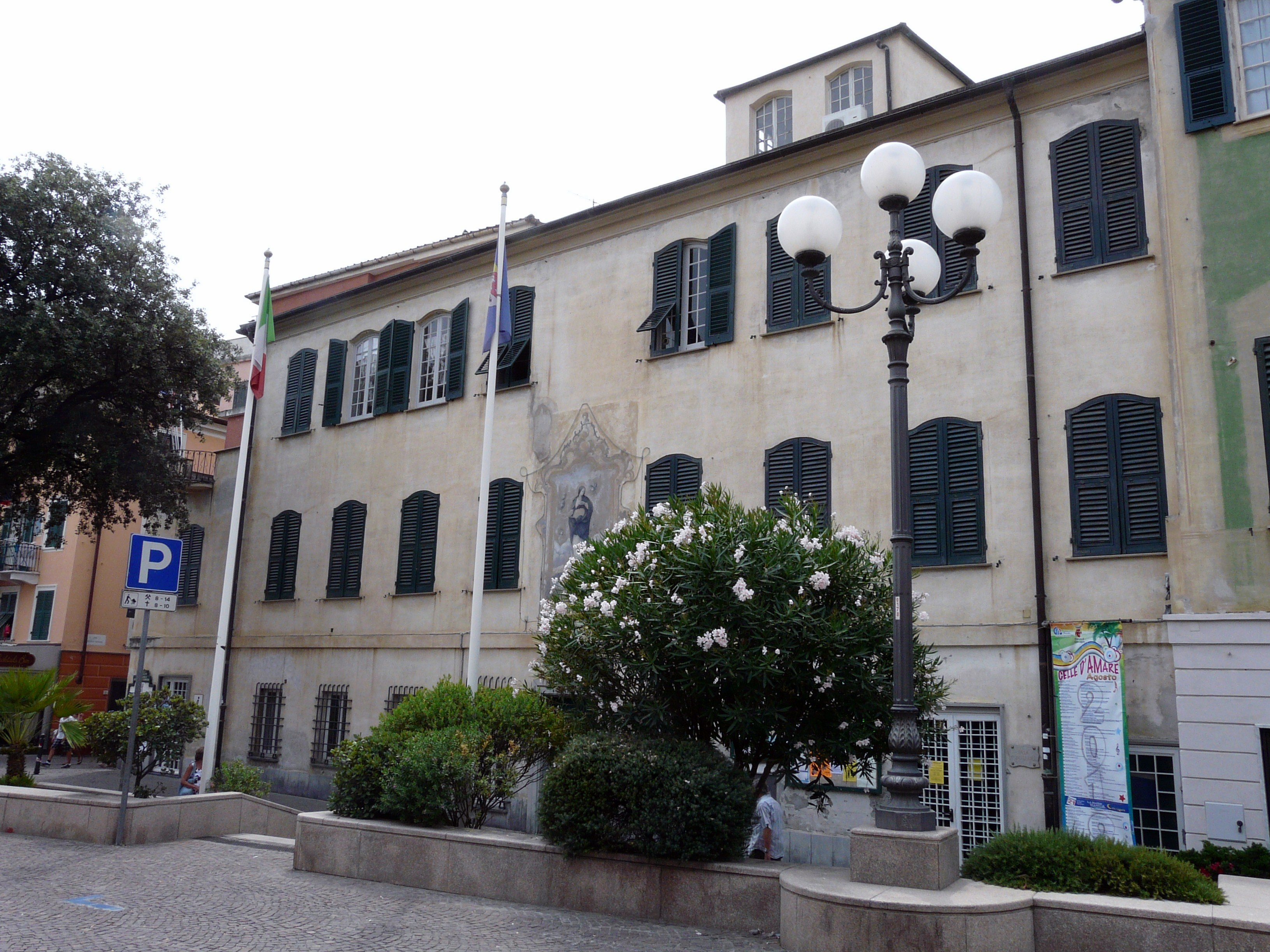 Municipio, Celle Ligure, Liguria, Italia